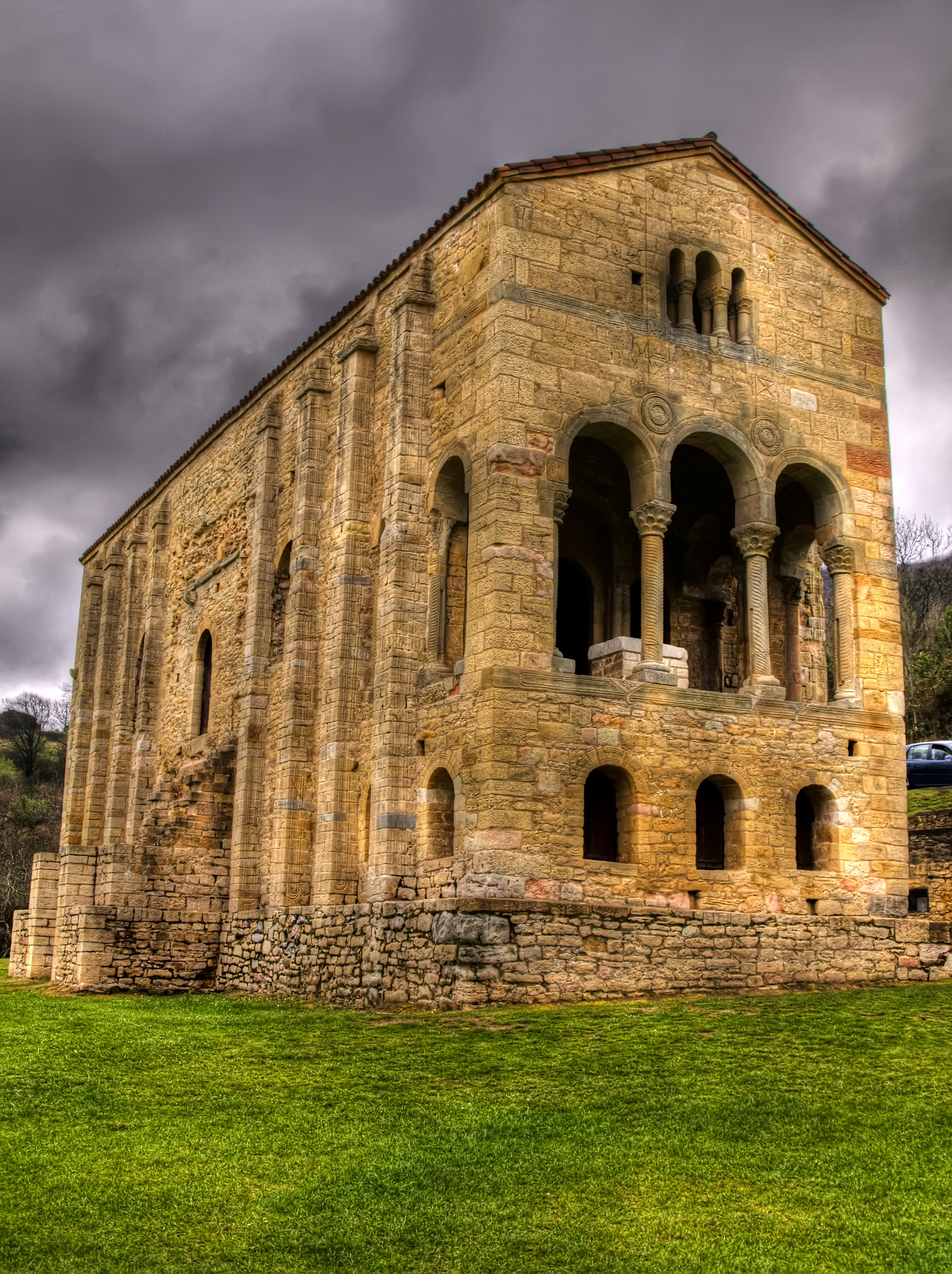 Oviedo_27_1